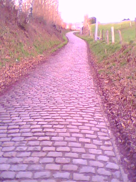 Vue du Vieux Quaremont